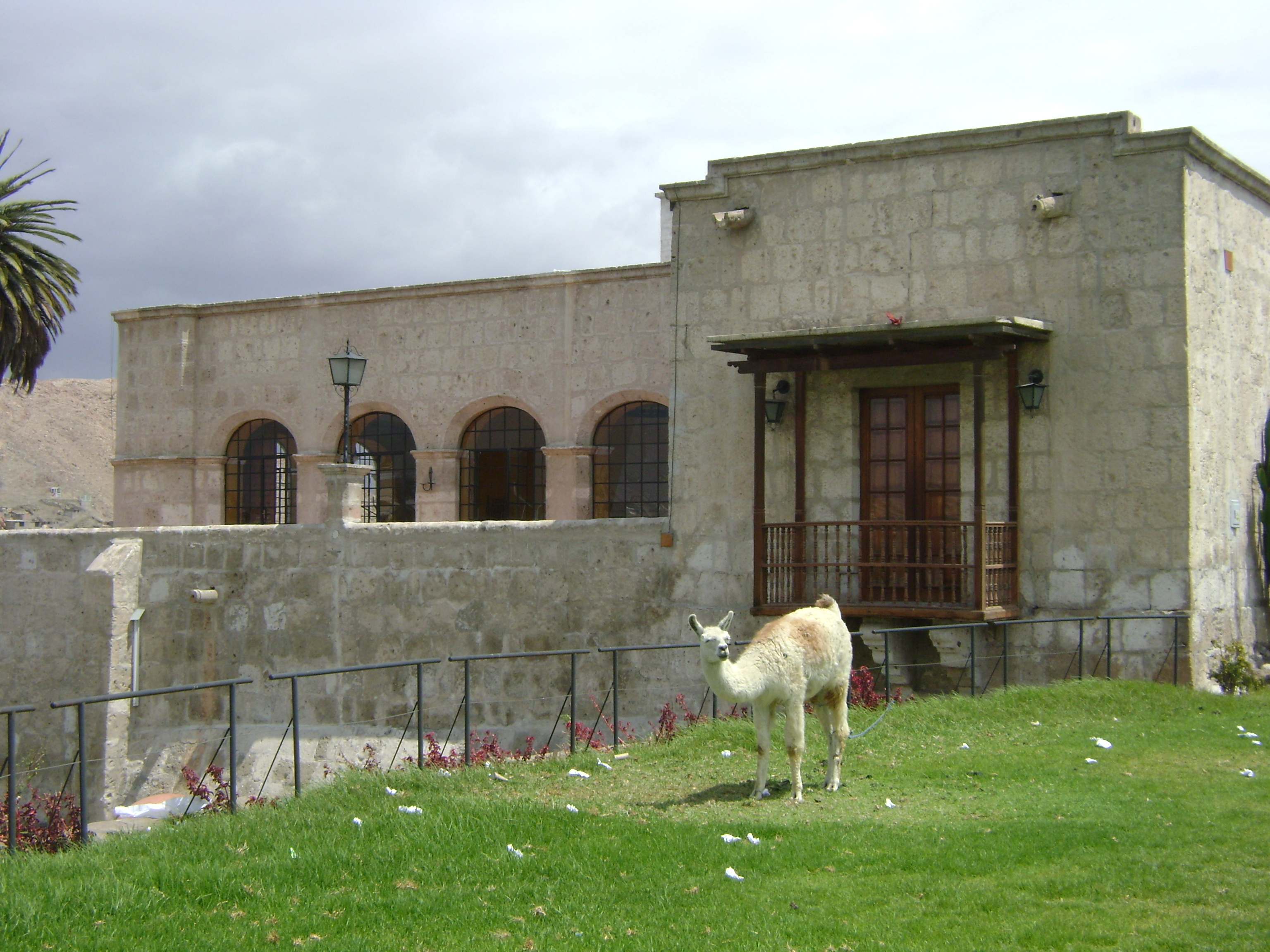 Casa de Goyeneche de Arequipa